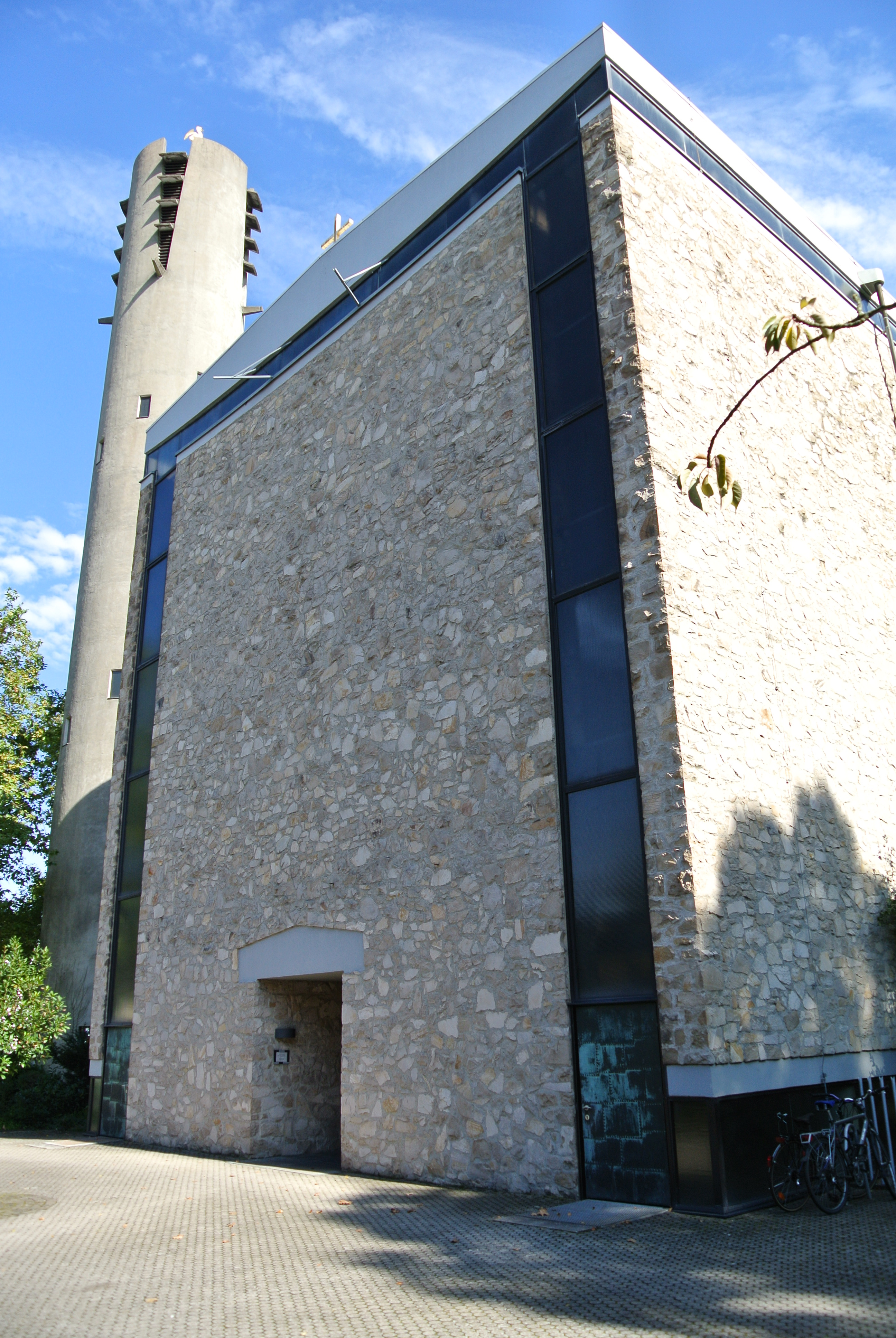 St. Wendel Kirche von Südwesten, Architekt Johannes Krahn, Baujahr 1957